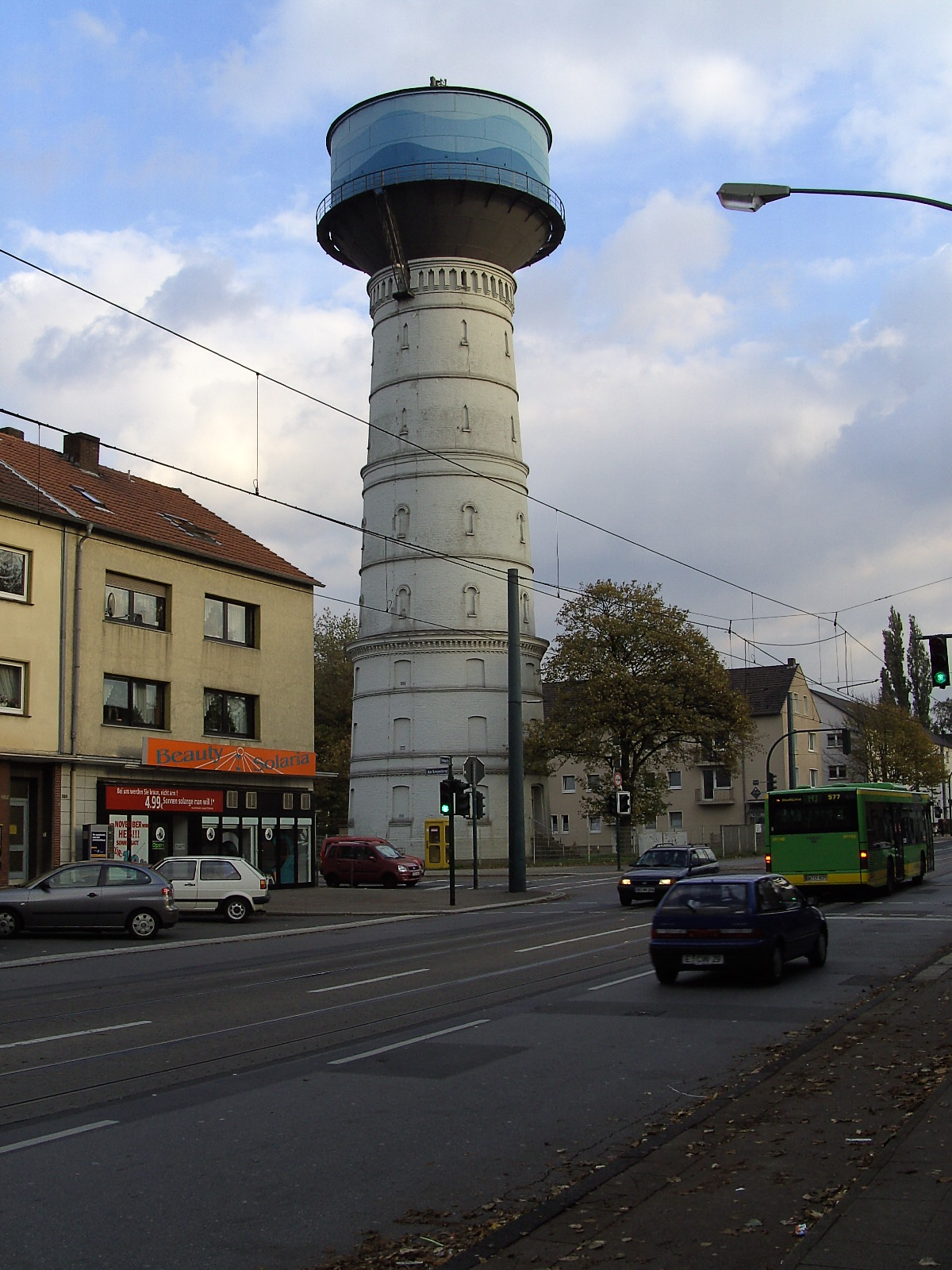 Wasserturm in Essen-Bedingrade (eigene Aufnahme)